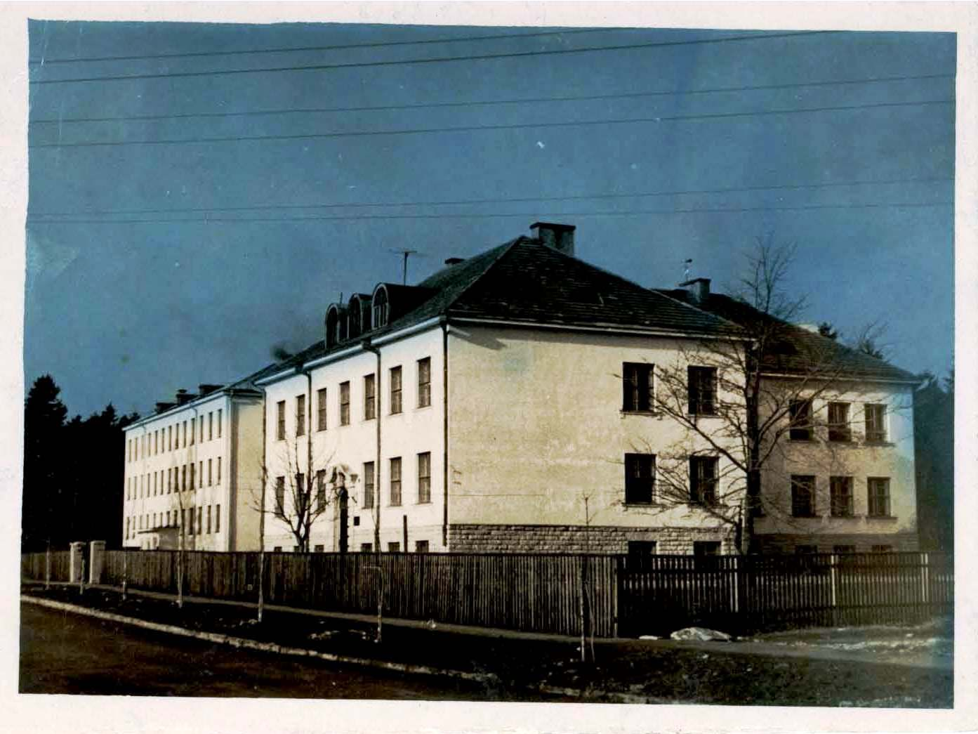 Vana foto Keila algkooli hoonest.